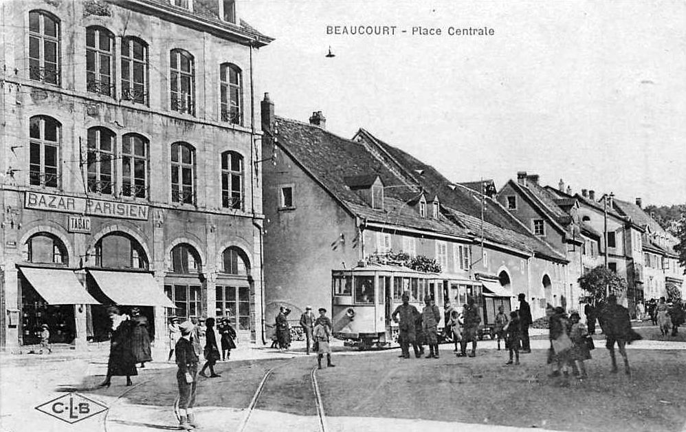 Carte postale ancienne éditée par CLB : BEAUCOURT - Place centrale. Un convoi du tramway sur la place centrale. Un wagon à marchandises est attelé à la motrice.